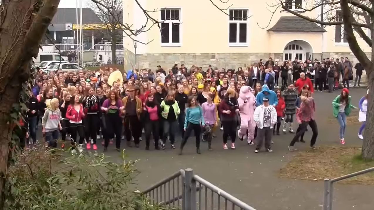 Flashmob des Helene-Weber-Berufskollegs zum 90jährigen Bestehen 24.3.2015